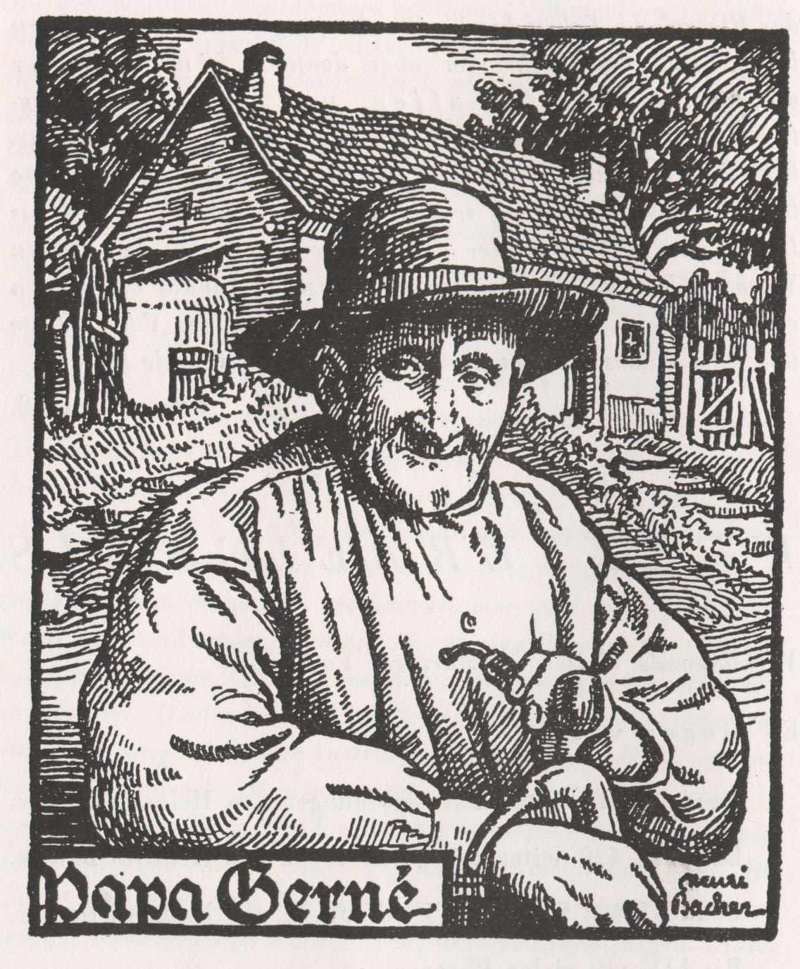 Papa Gerne aus Hambach Lothringen